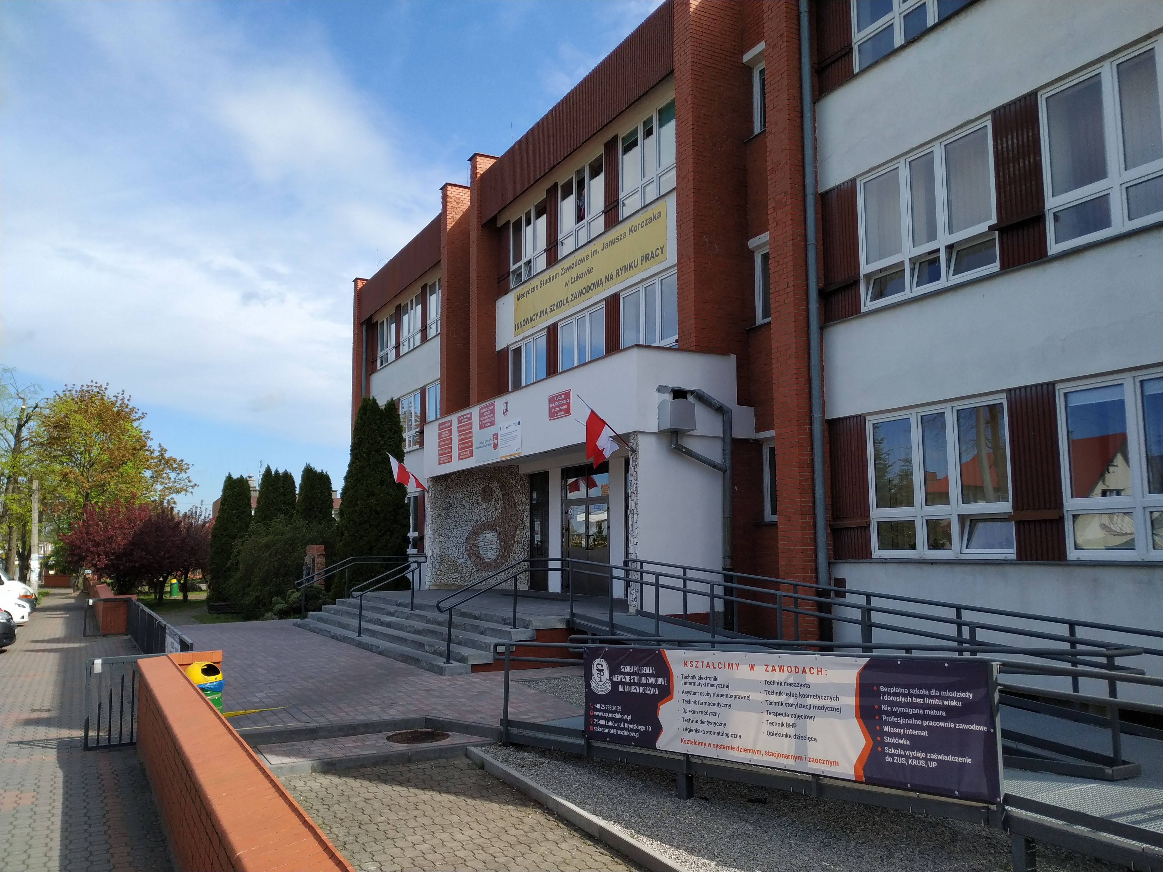 Budynek IV Liceum Ogólnokształcącego im. Jana Pawła II i Medycznego Studium Zawodowego im. Janusza Korczaka